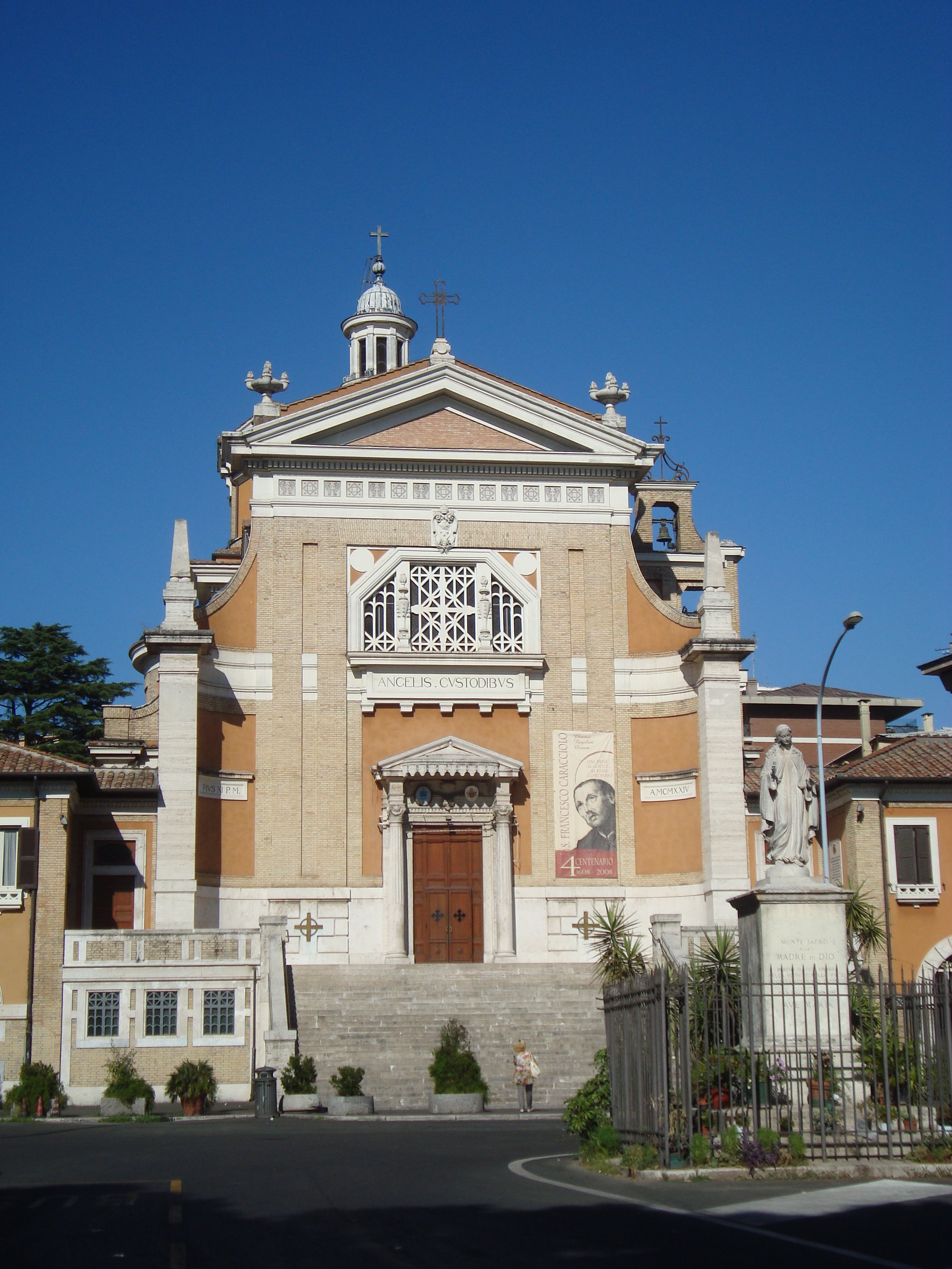 Eglise Santi Angeli Custodi dans le quartier de Monte Sacro à Rome